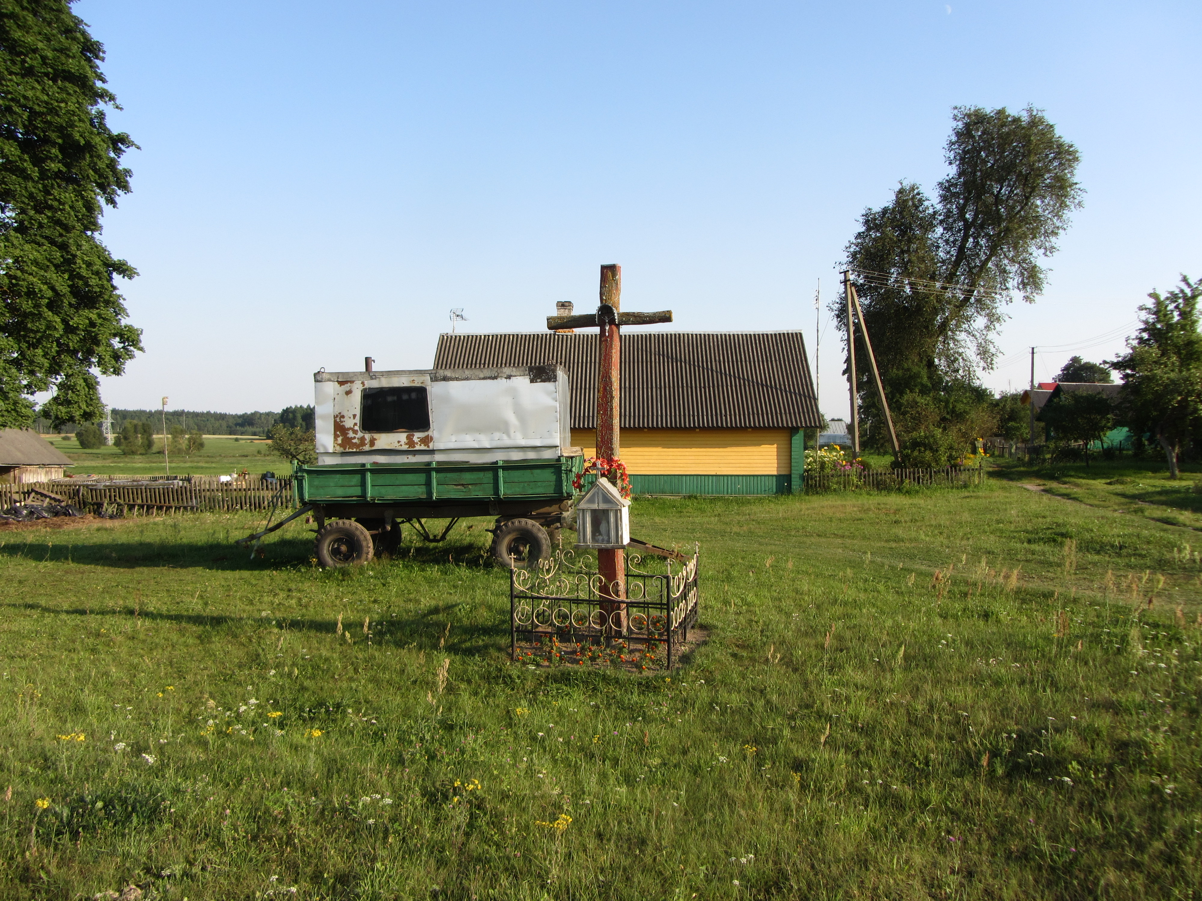 Naujasėdžiai 17270, Lithuania